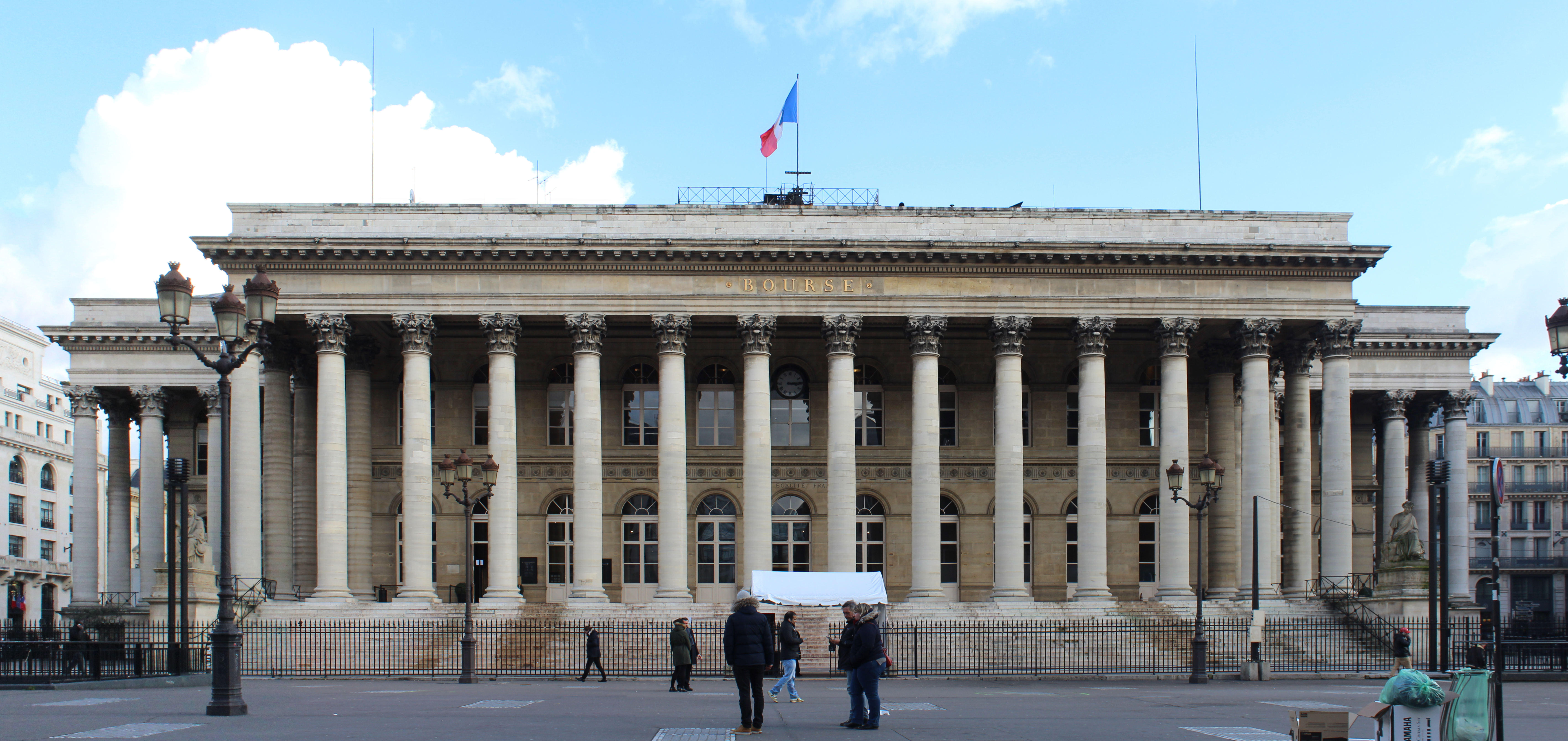 Palais Brongniart, Paris.